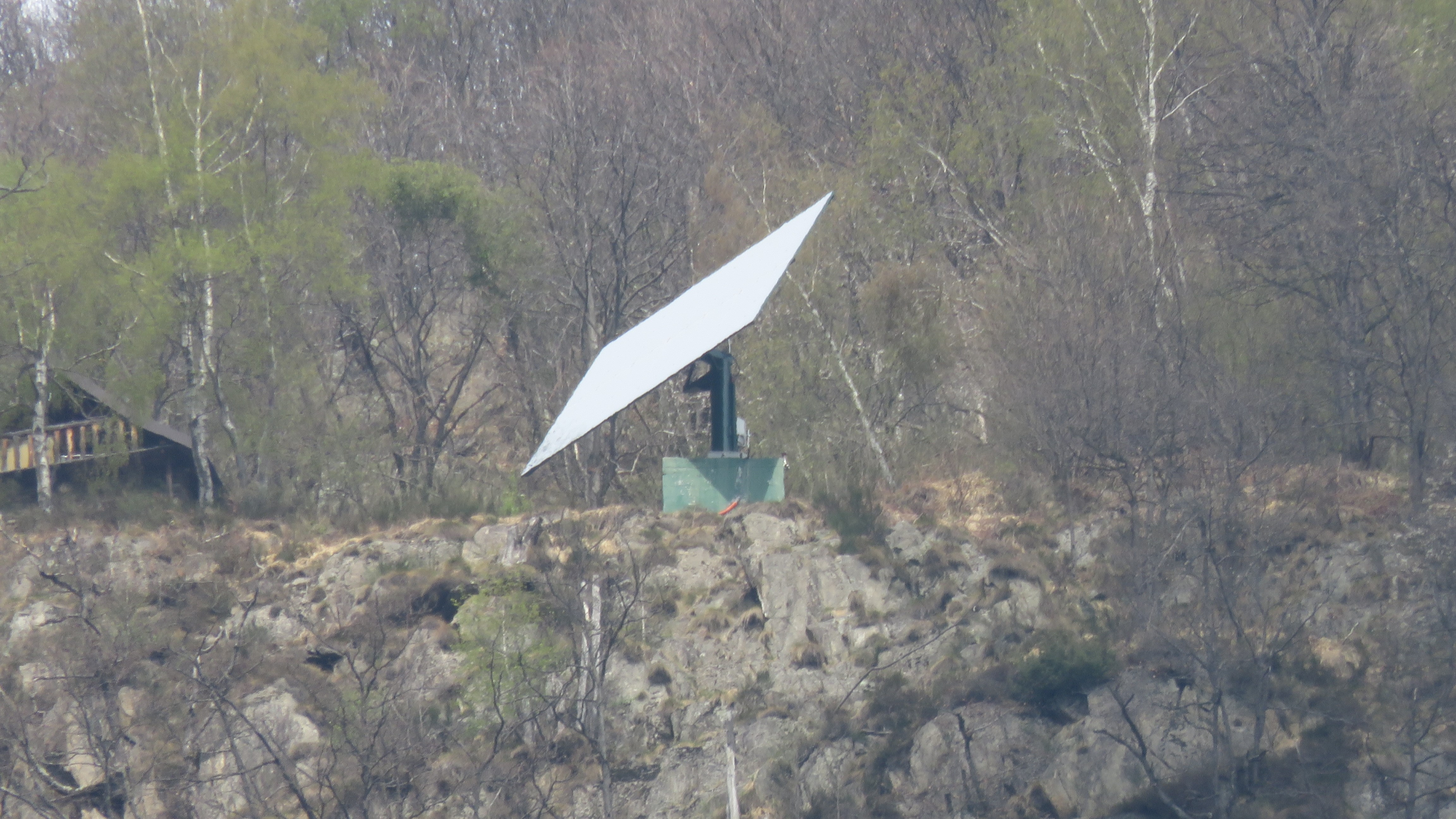 Lo specchio di Viganella